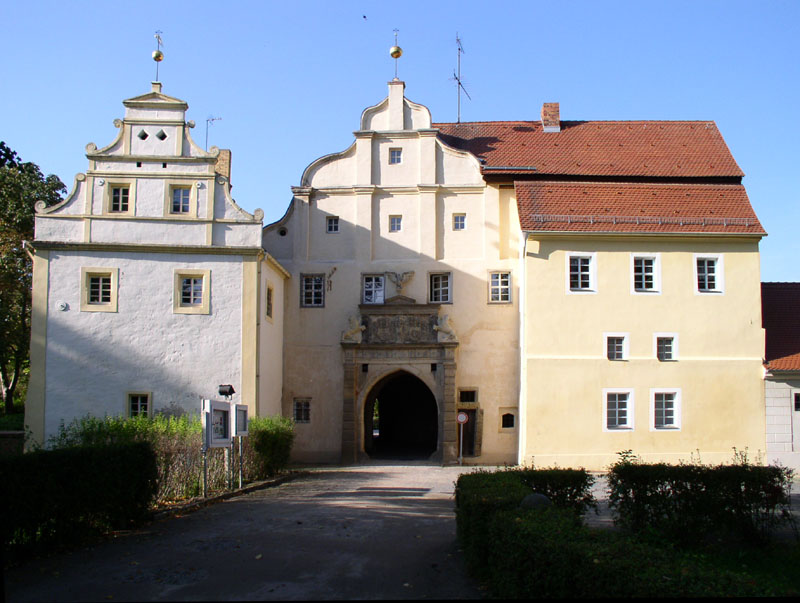 Schloss Sonnewalde, Vorderschloss